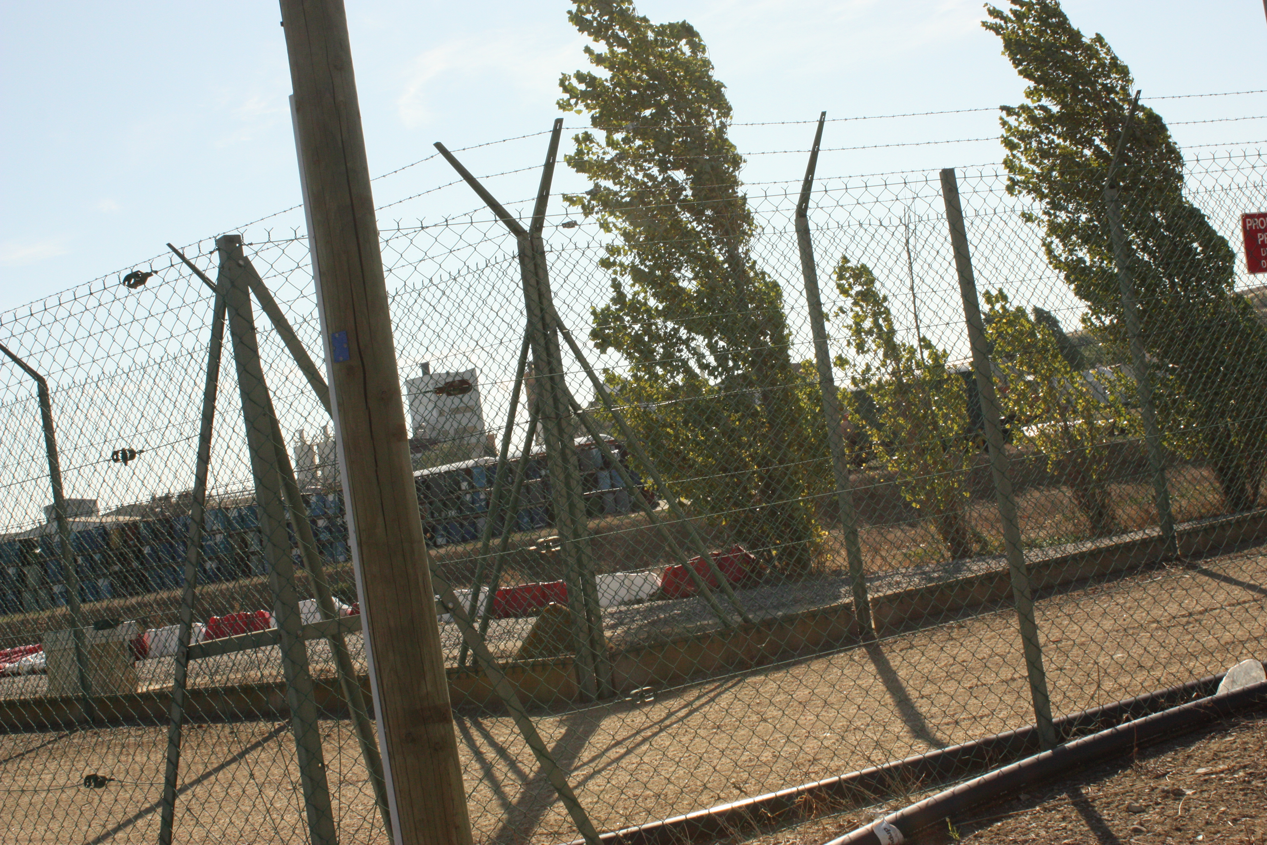 Photo des futs d'uranium stockés sur la partie nord du site de l'usine de Malvési, depuis l’extérieur du site.